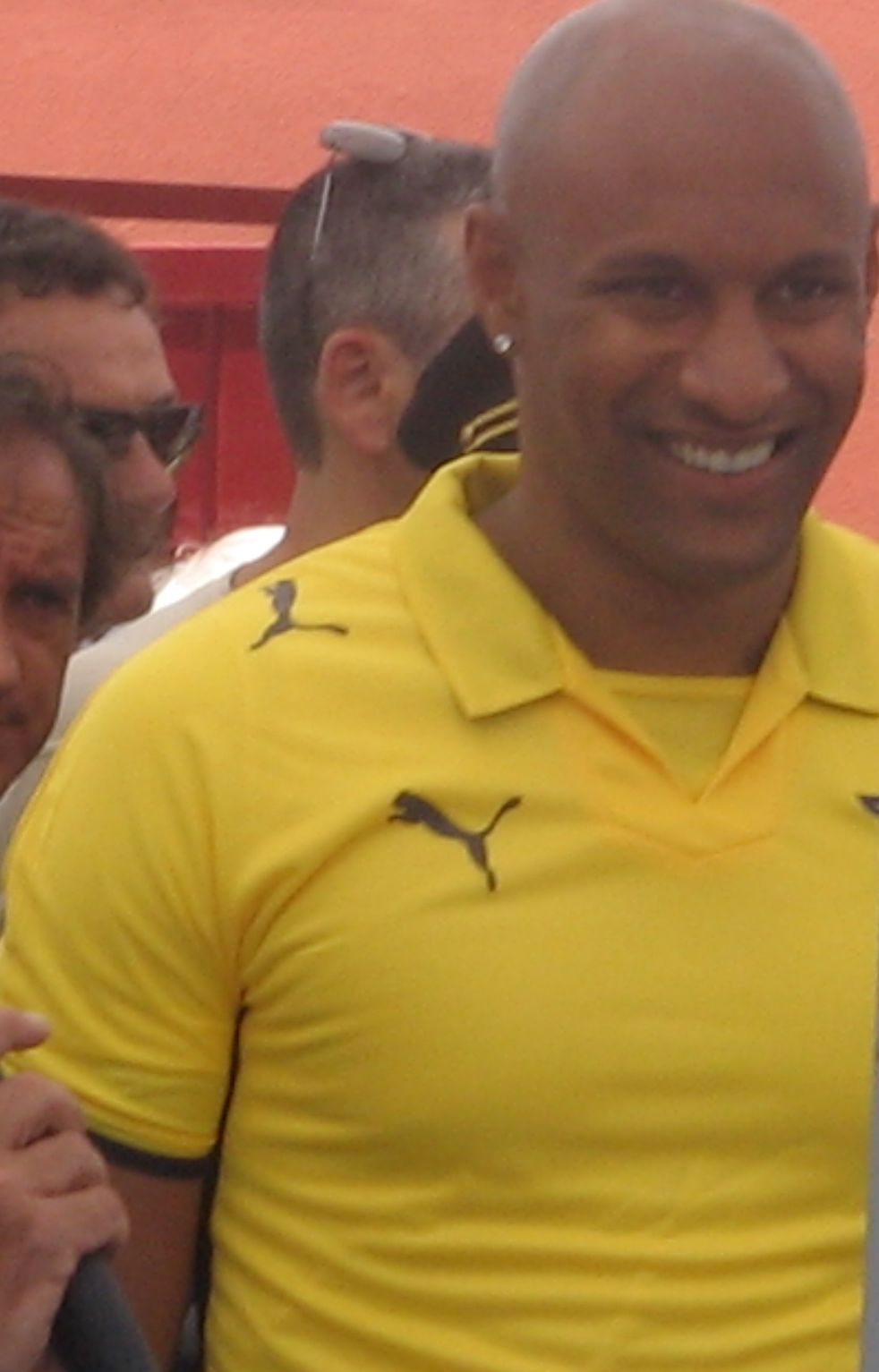 Ousmane Dabo alla presentazione delle maglie della Lazio 2008/2009